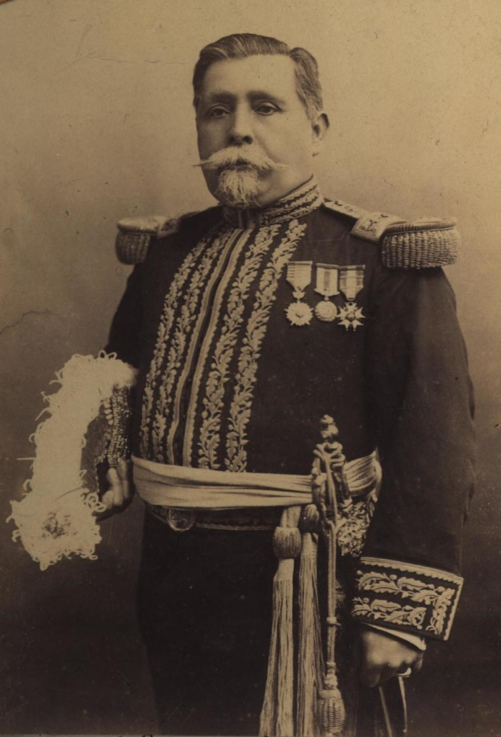 Estanislao del Canto Arteaga. Fotografía de Spencer y Cía.